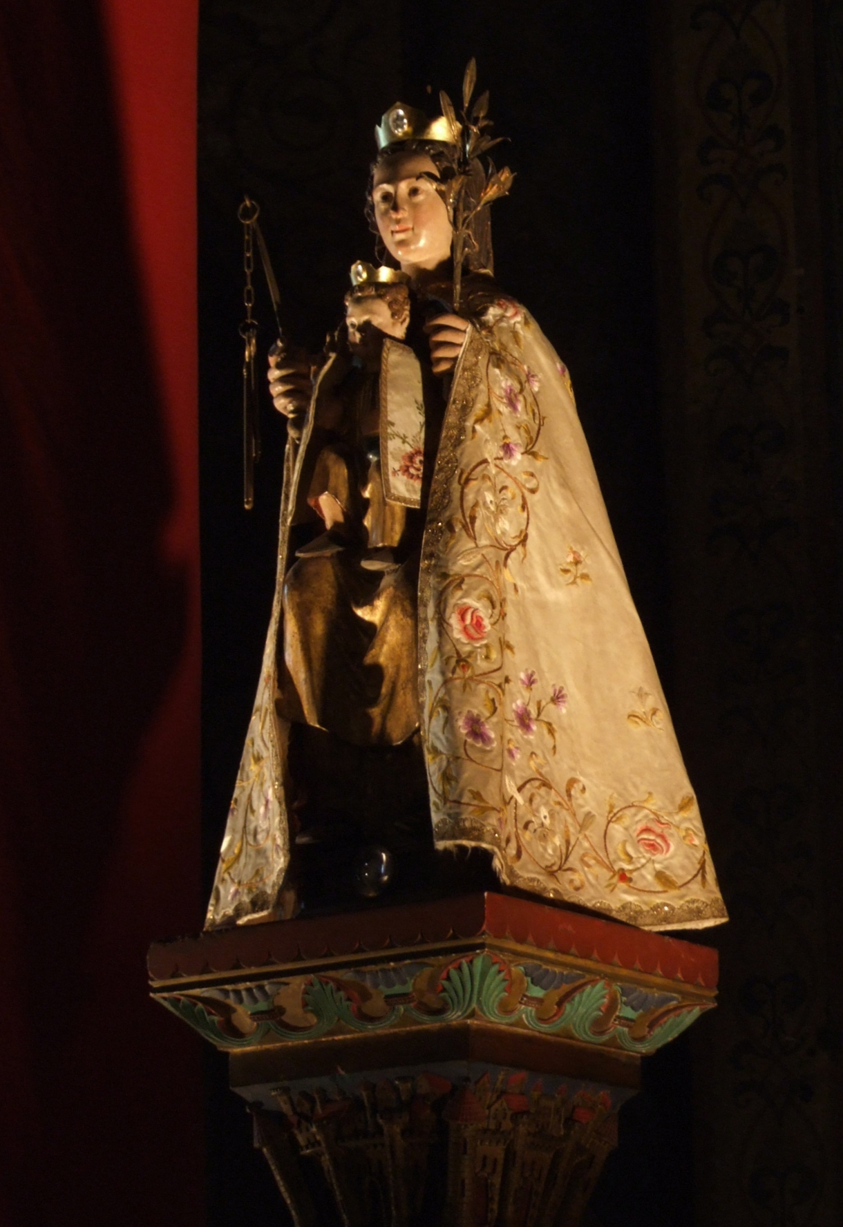 Notre Dame des clefs, Notre-Dame la Grande de Poitiers, Poitiers, Poitou-Charentes, FRANCE